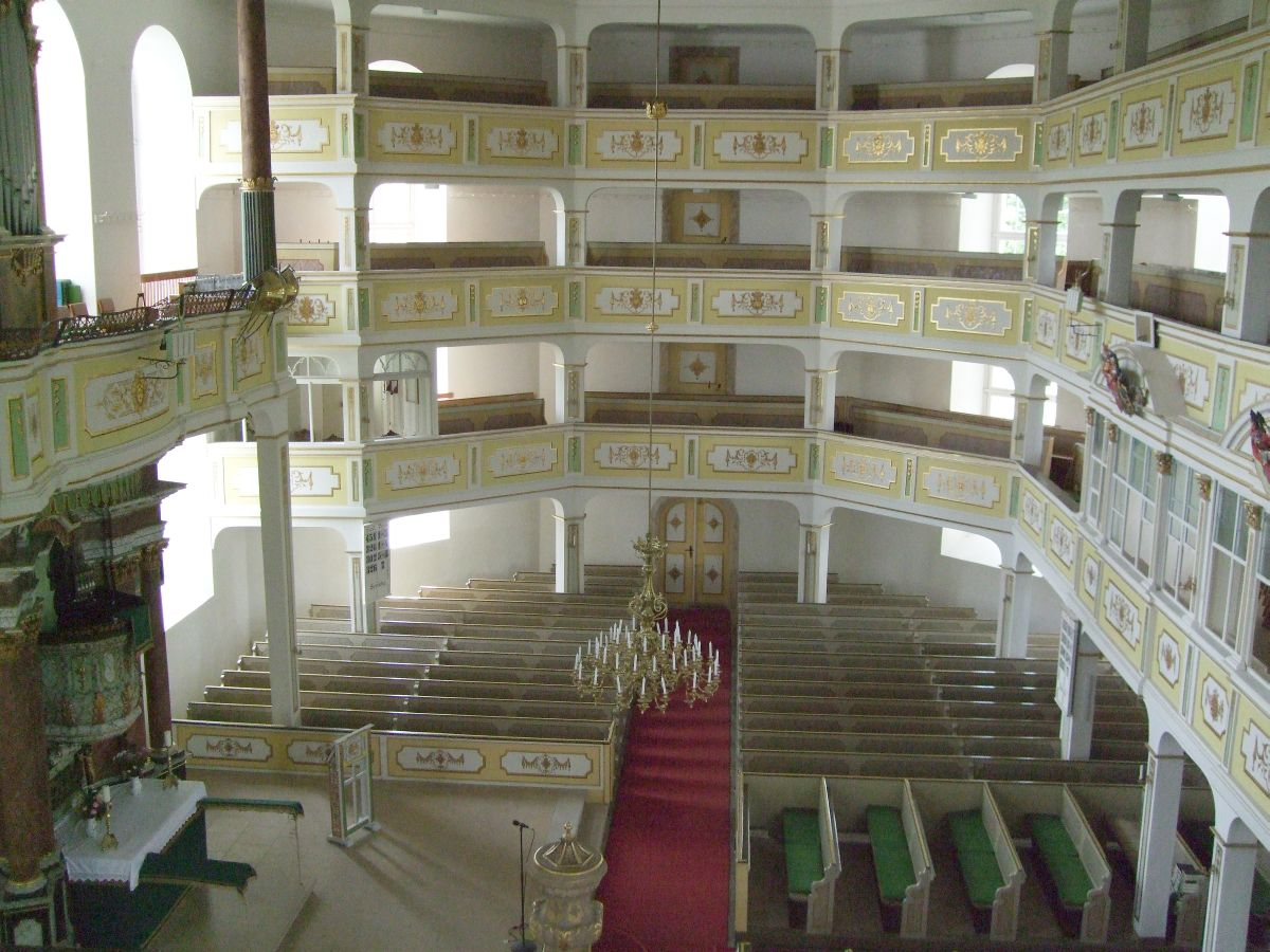 Barockkirche von Pretzschendorf in Sachsen, Innenraum vom Nordostteil der 2. Empore aus nach Südwesten gesehen. Links der Altar und das Taufbecken, rechts die Herrschaftslogen